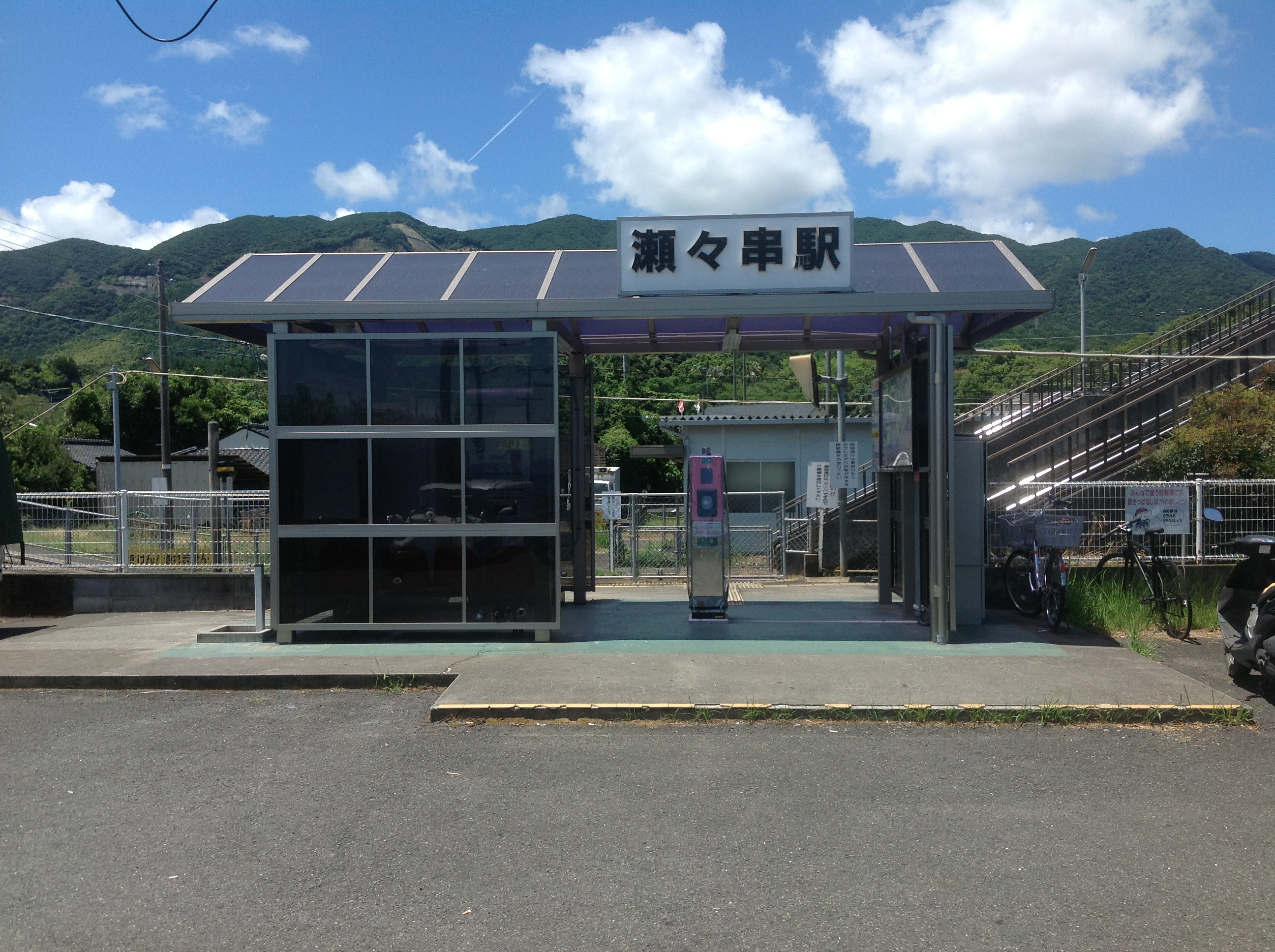 瀬々串駅駅舎